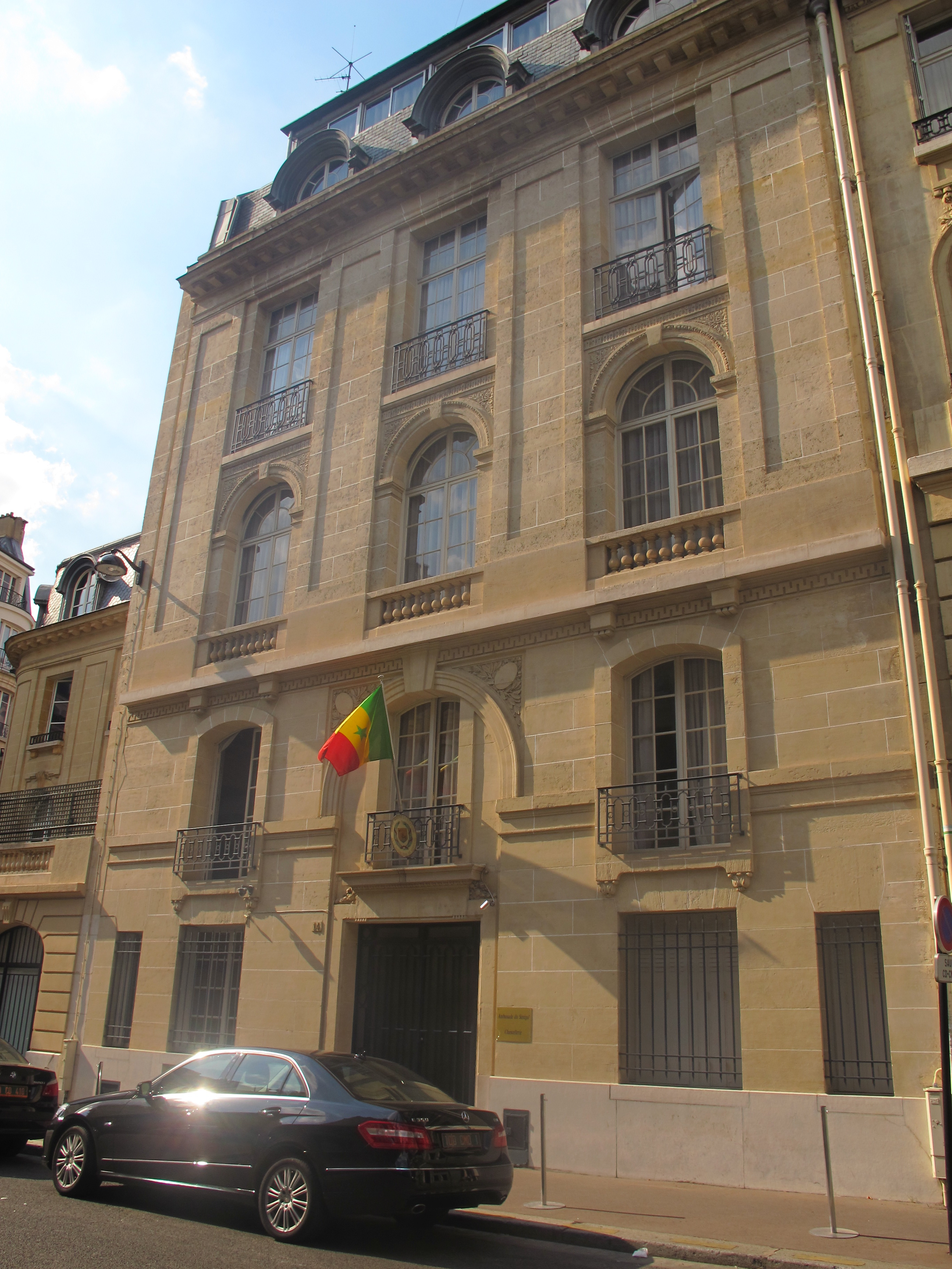 Chancellerie de l'ambassade du Sénégal en France, 14 avenue Robert-Schuman, 7e arrondissement de Paris.